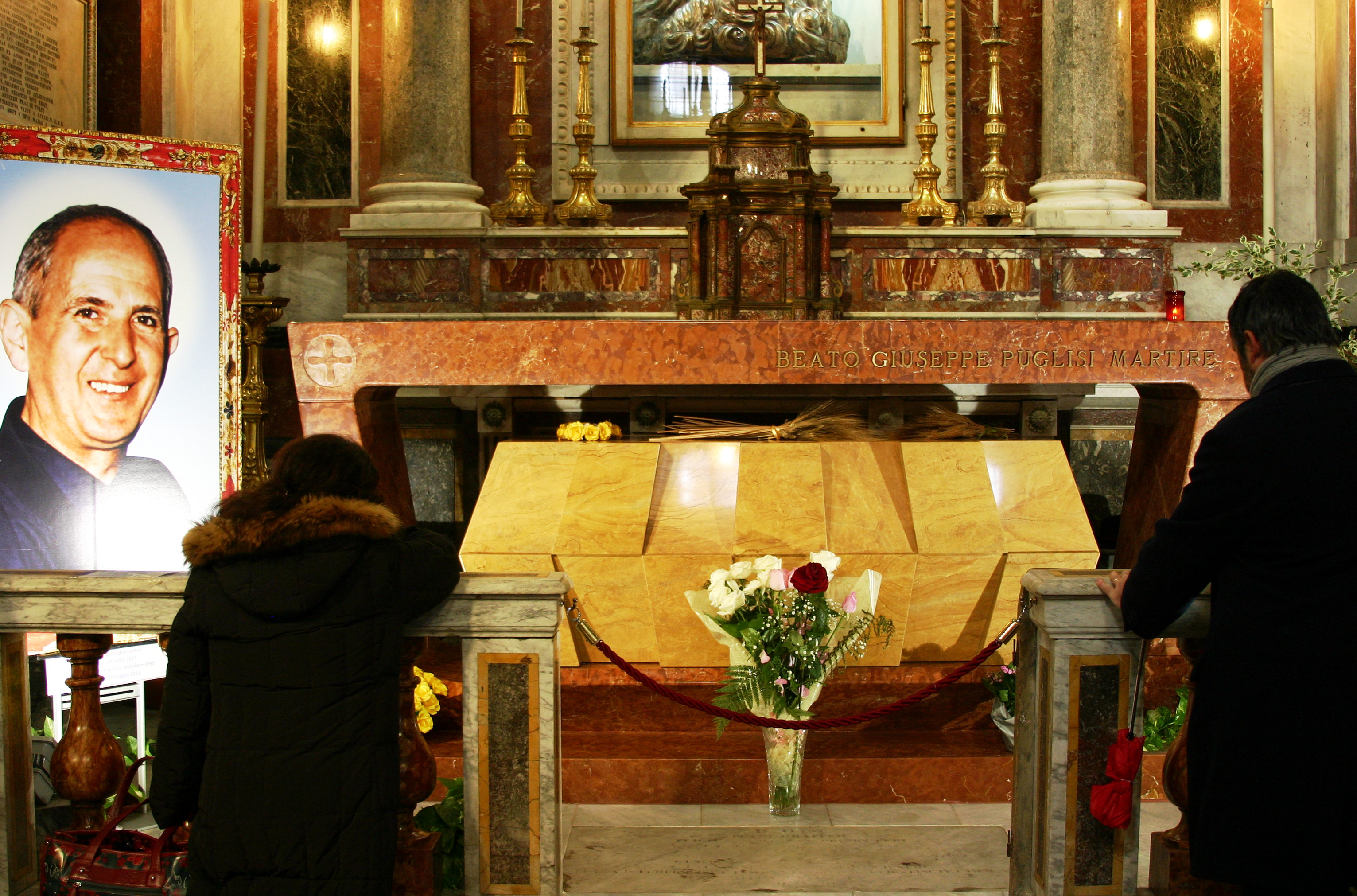 Cathedral of Palermo